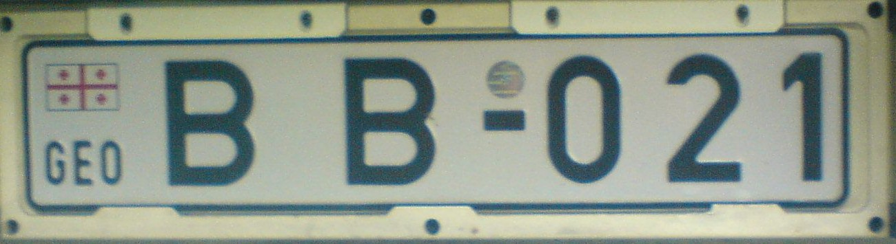 Kfz-Kennzeichen Georgien, Trailer